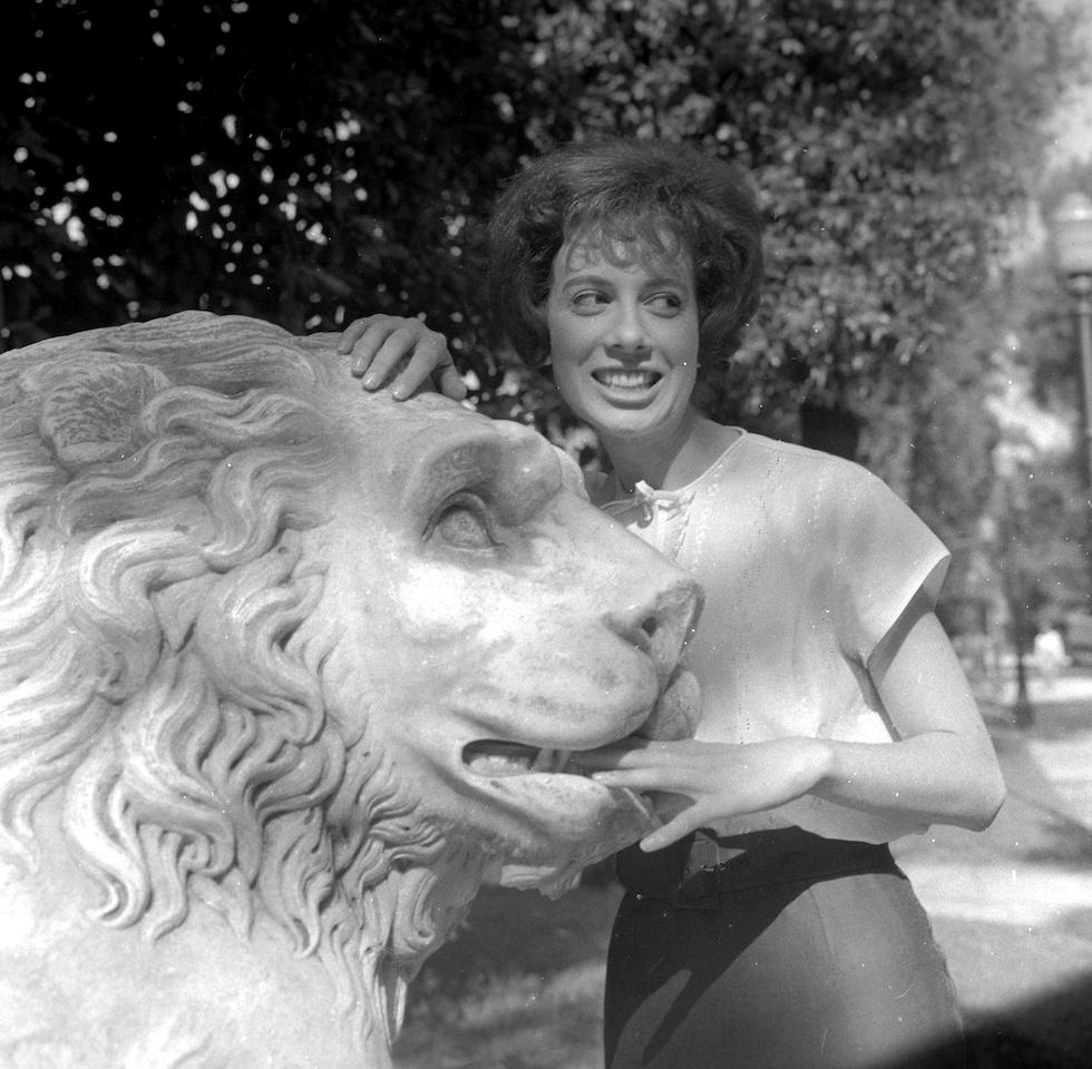 Roma, 21 agosto 1961. L'annunciatrice e conduttrice televisiva italiana Rosanna Vaudetti.